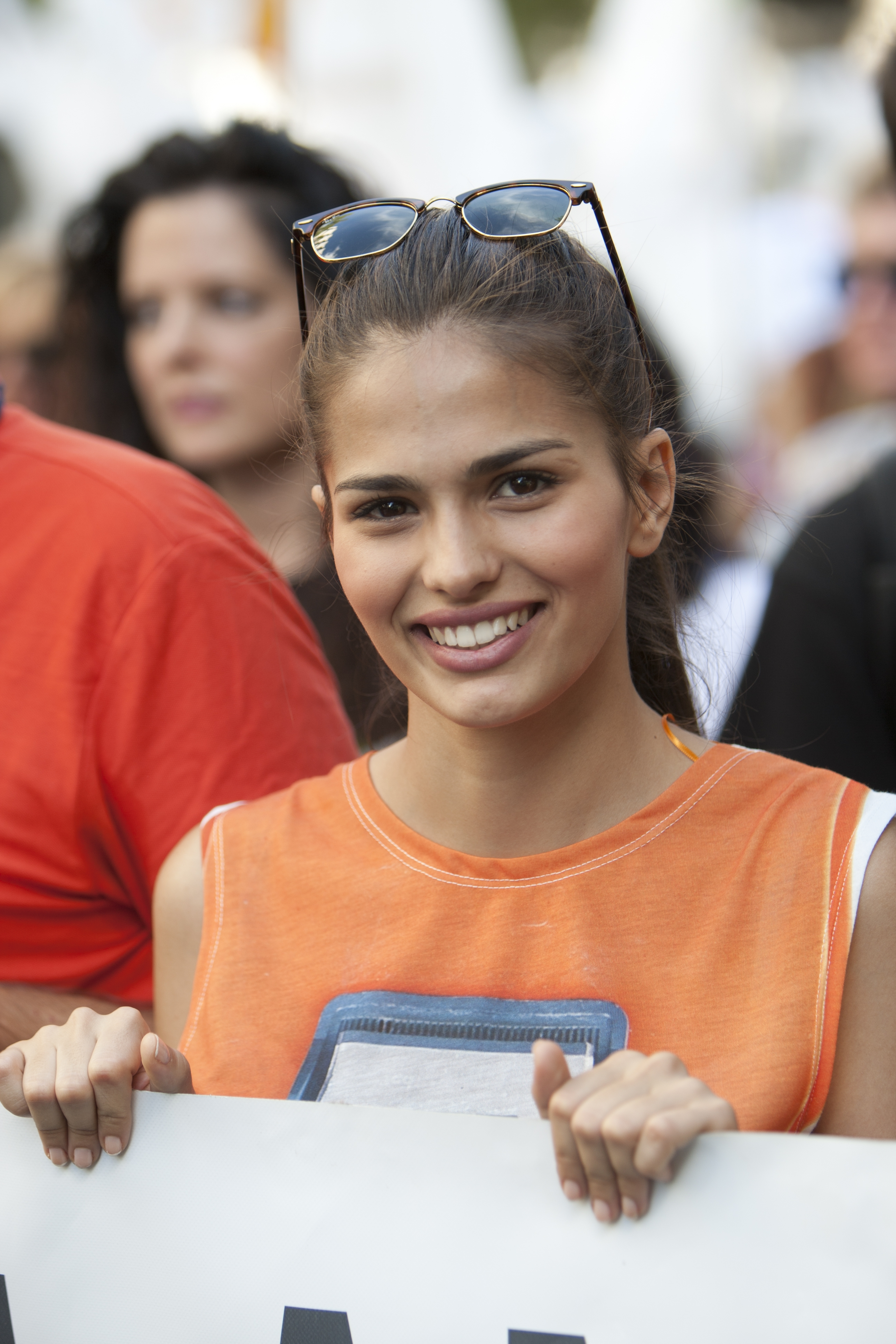 Sara Sálamo Un clamor popular pidió por la vida de Elegido. Mas de 45.000 personas recorrimos Madrid, desde la sede del PP a la del PSOE, para pedir a sus dirigentes la prohibición del cruel festejo del Toro de la Vega de Tordesillas. Los políticos responsables son el alcalde socialista de Tordesillas que organiza el festejo y el delegado de la Junta de CyL que lo autoriza. Fotos de Juan Zarza